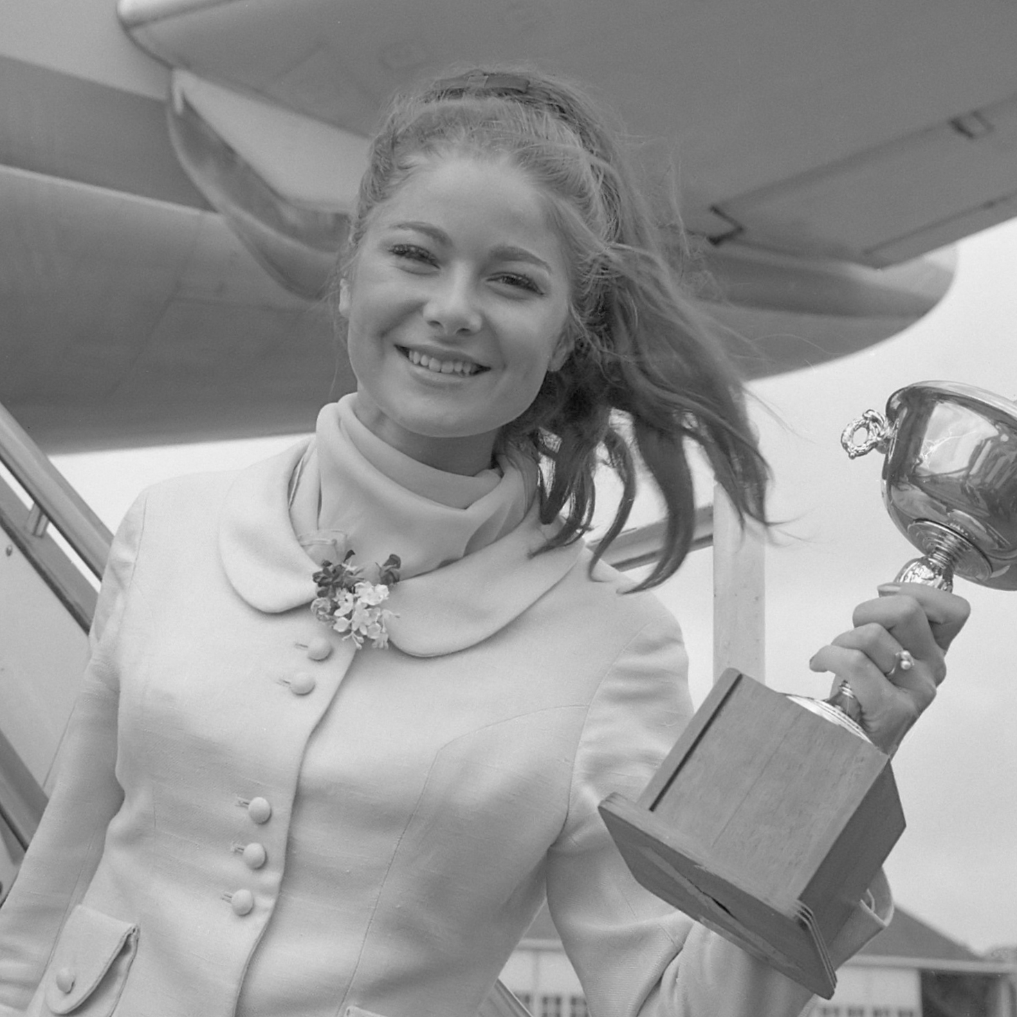 Ingrid Bethke ( Miss Duitsland ) bij aankomst Schiphol 29 juli 1965